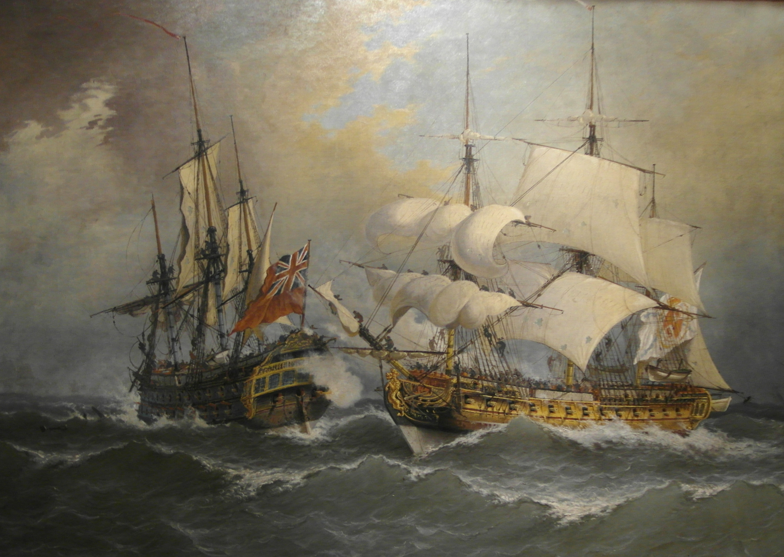 El lienzo representa el enfrentamiento, que tuvo lugar hacia 1710, entre una fragata española y el navío británico Stanhope.